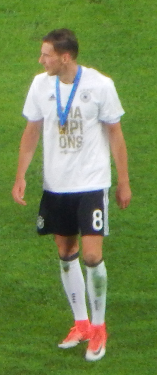 Финал Кубка конфедераций 2017